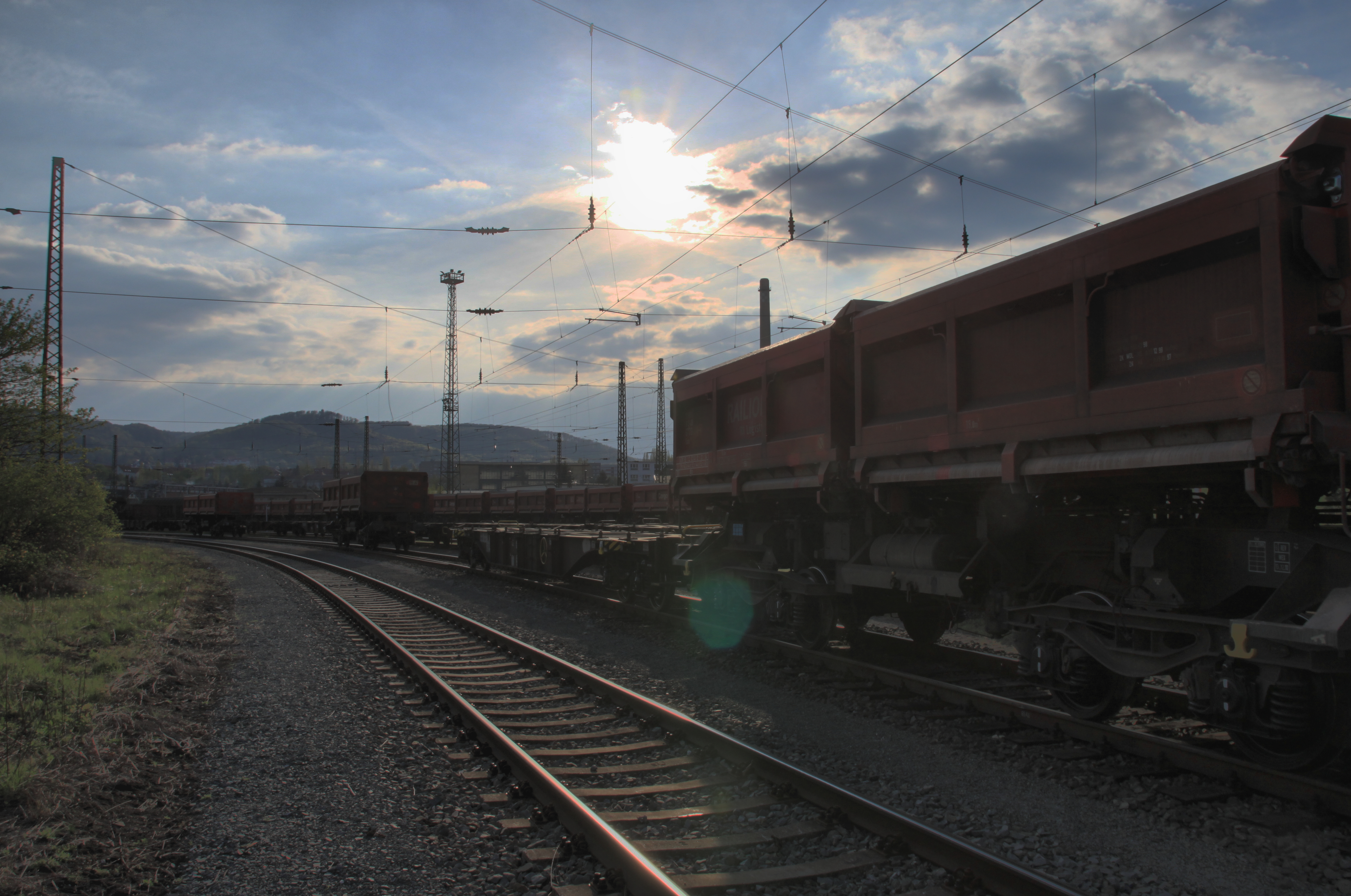 Bahnhof Blankenburg